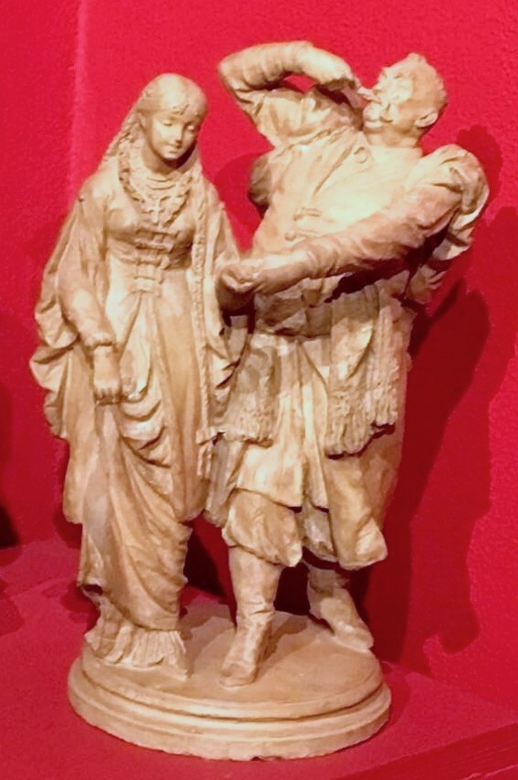 Polonez - rzeźba Antoniego Kurzawy, 1888